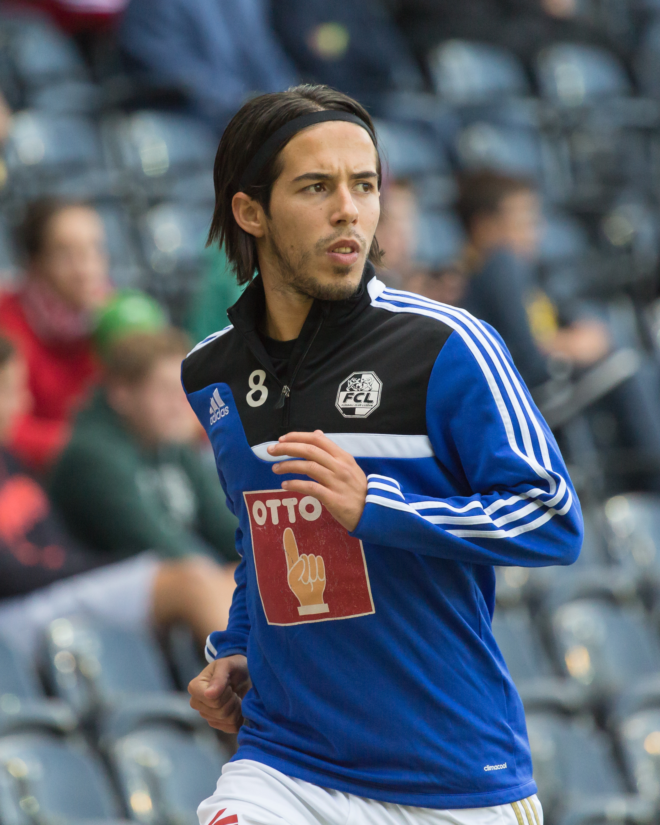 Jahmir Hyka beim Spiel des BSC Young Boys gegen den FC Luzern